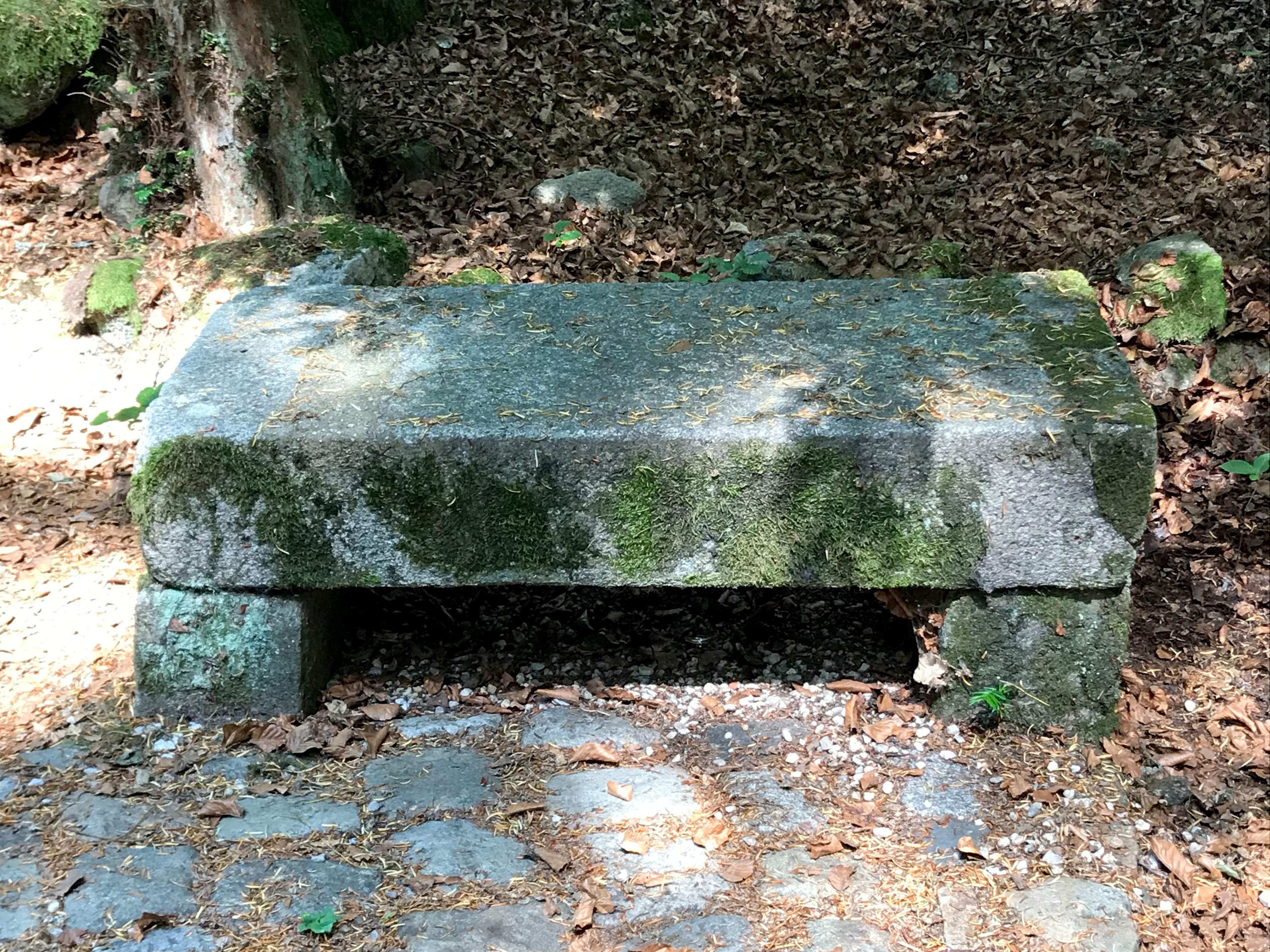 Boční lavička na Lesní pobožnost v lázeňských lesích v Karlových Varech